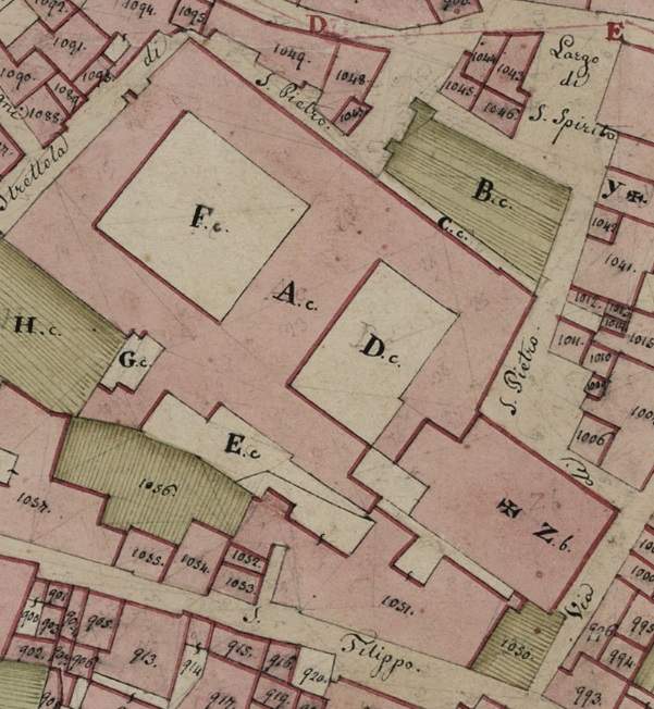 Dettaglio del monastero di San Pietro dalla pianta catastale di Benevento del 1823.